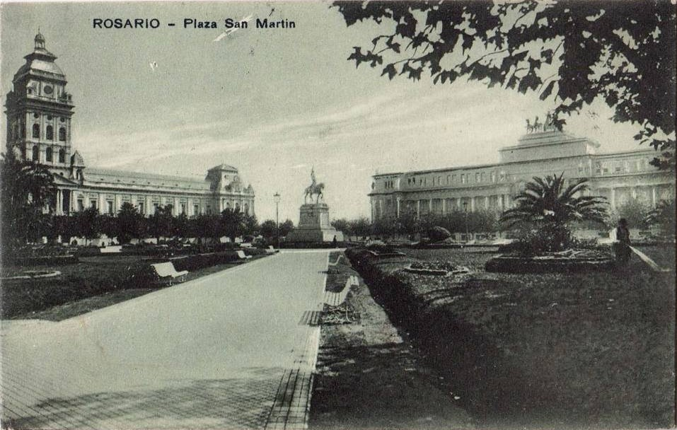 Vista de la Plaza San Martin en Rosario de Santa Fe, Argentina, década de 1920.